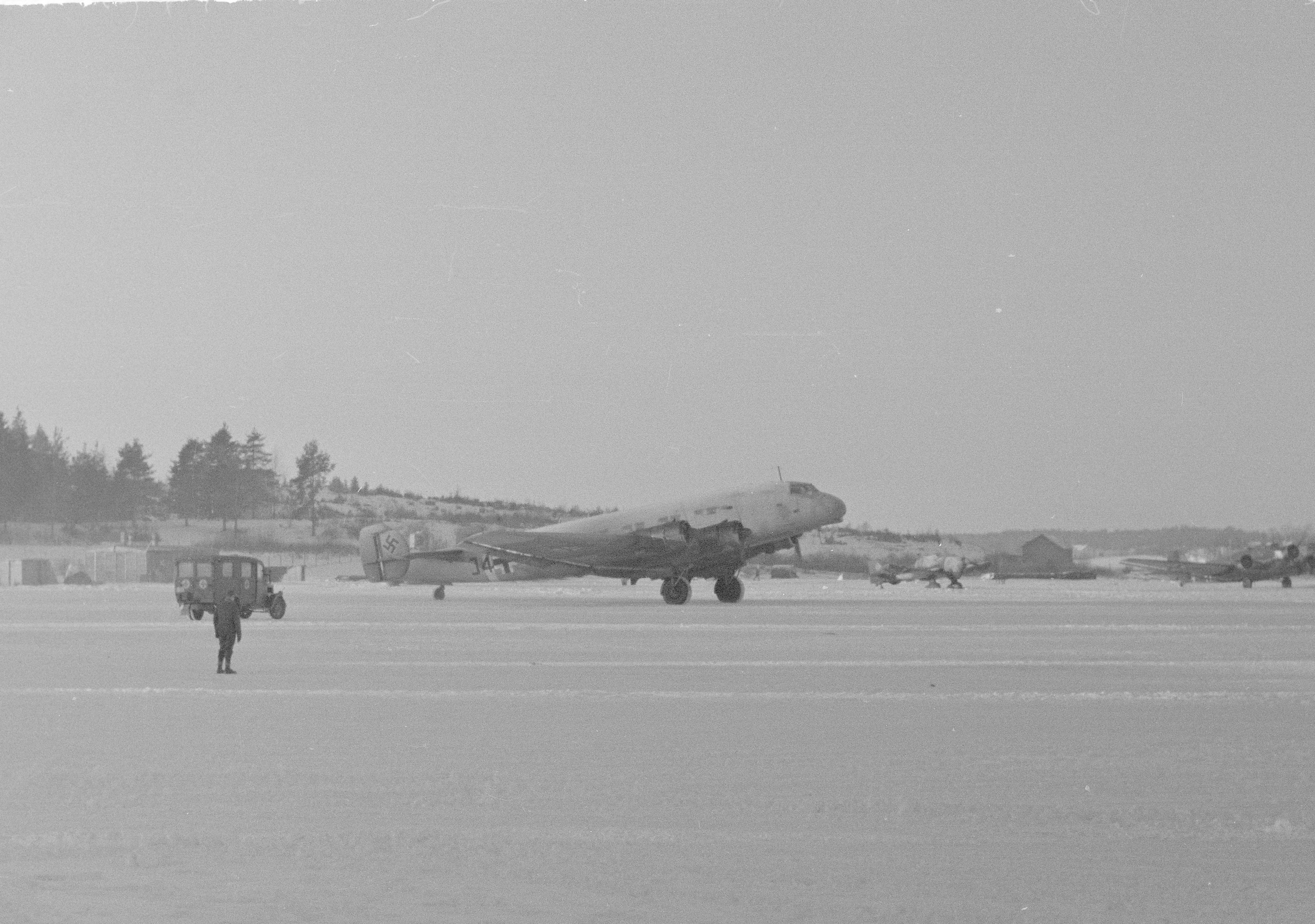 Saksalaiset rakentavat radiosuuntima-aseman Nurmoilaan. Kaikki tarvikkeet ja henkilökunta kuljetetaan lentoteitse Tallinnasta Malmin kautta. Kuvissa nelimoottorinen JU-90-tyyppinen kuljetuskone starttaa Malmin lentokentältä. (Kuvassa Junkers Ju 90B-1). Kuvauspaikka: Malmin lentoasema